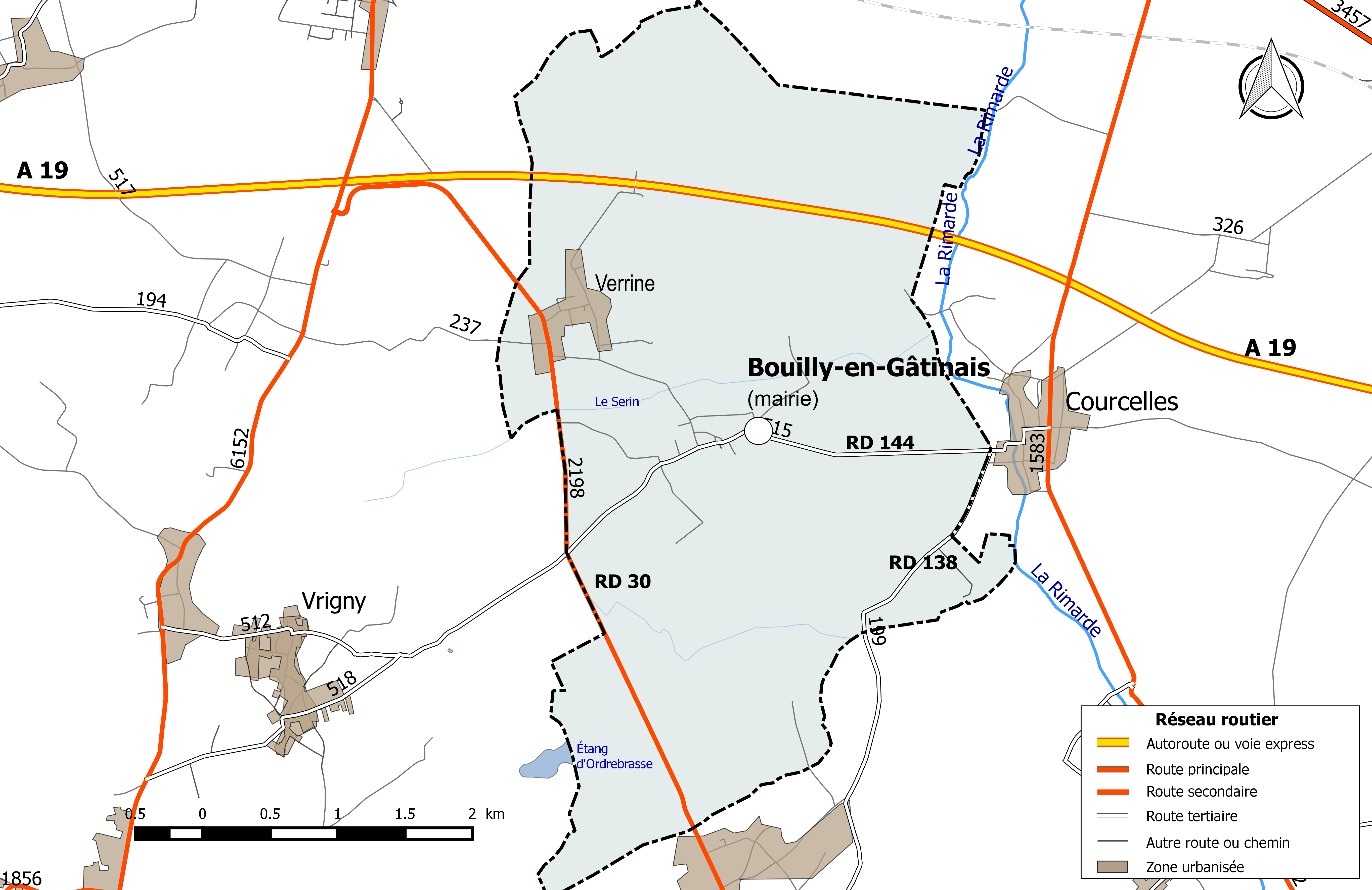 Carte du réseau routier de la commune de Bouilly-en-Gâtinais.